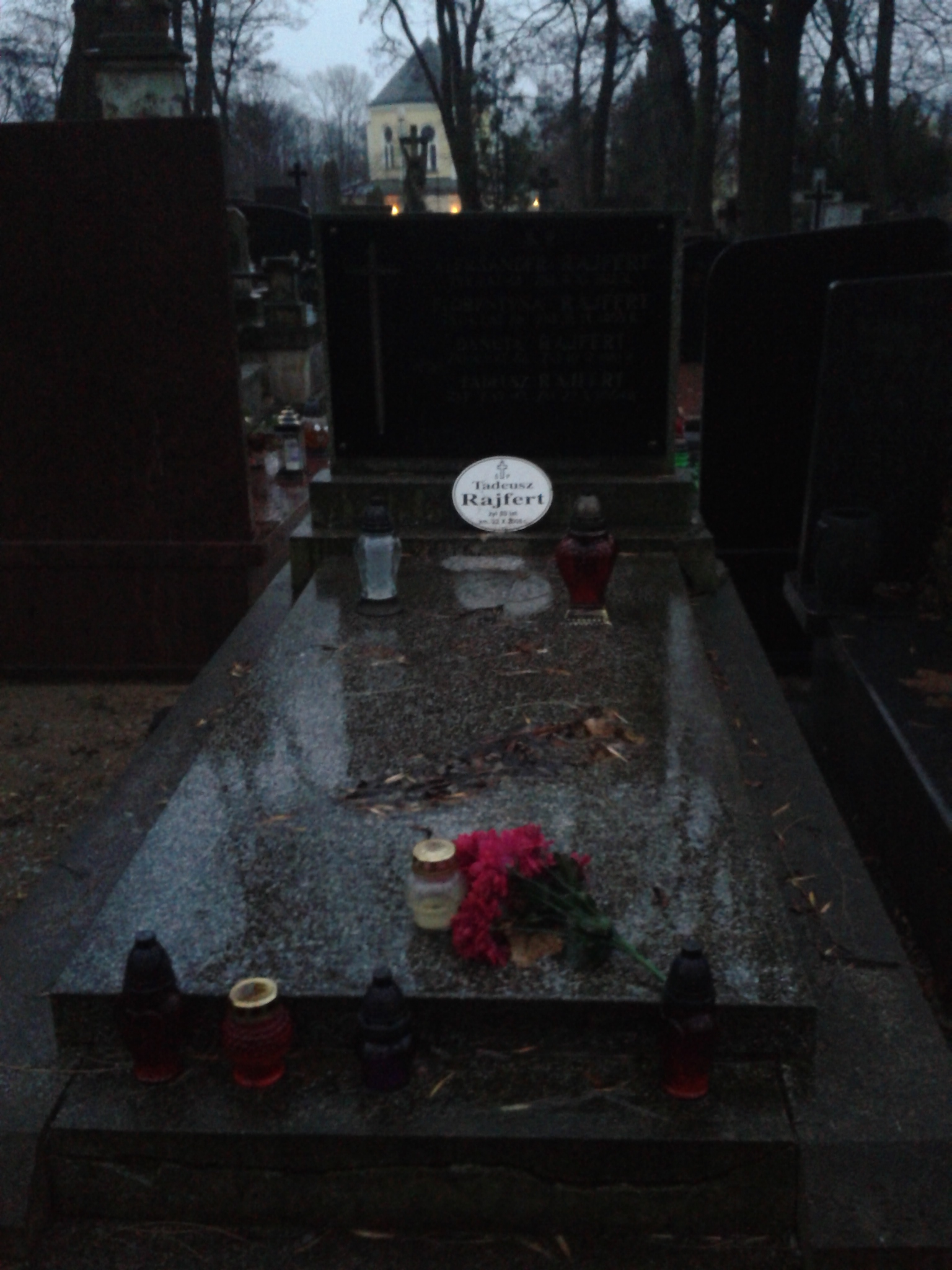 Grób prof. Tadeusza Rajferta